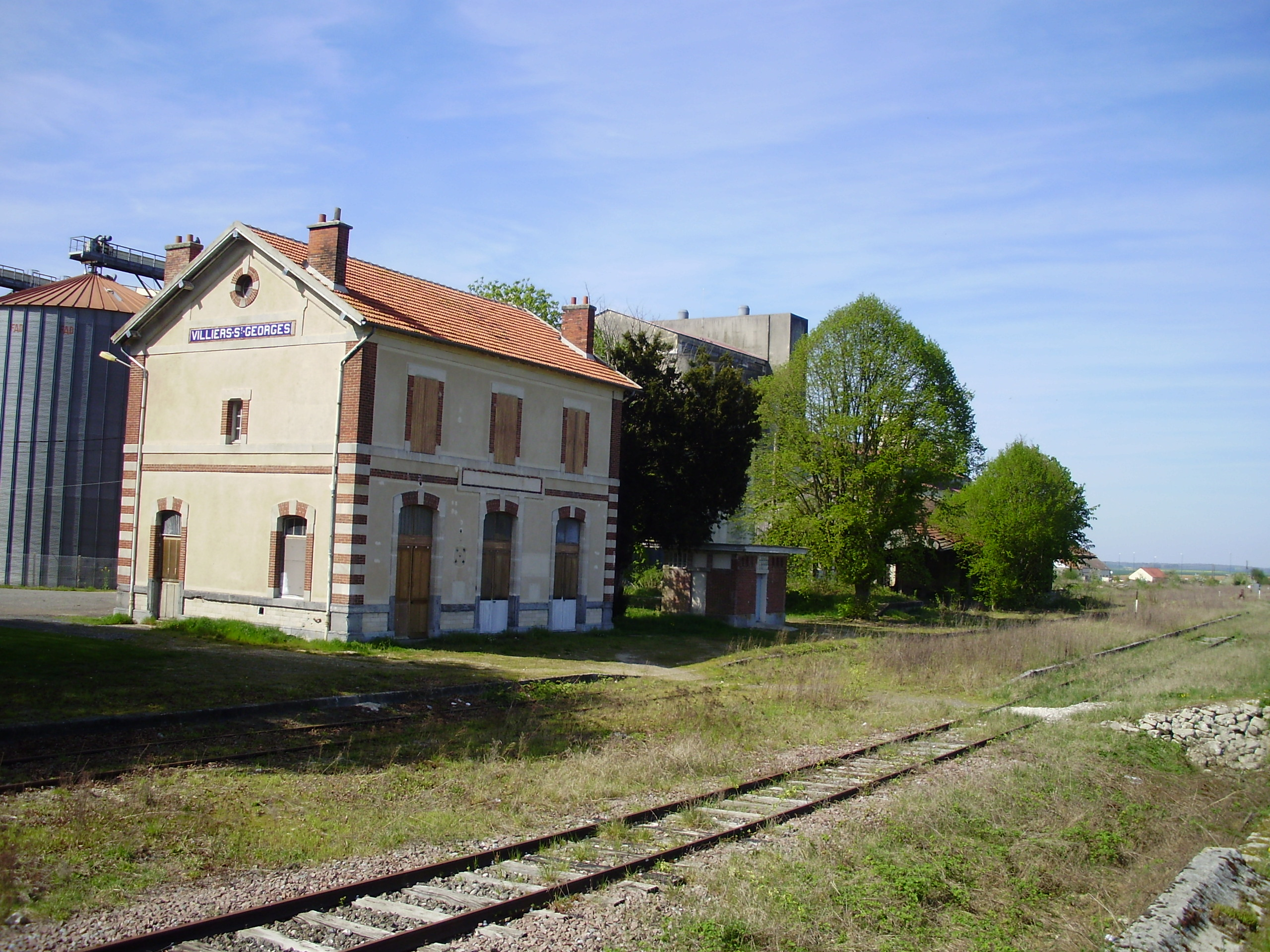 Gare de Villiers-Saint-Georges, Seine-et-Marne, France (vue d'ensemble du bâtiment voyageurs, fermé, et de l'ancien quai, en regardant à droite en direction d'Esternay)